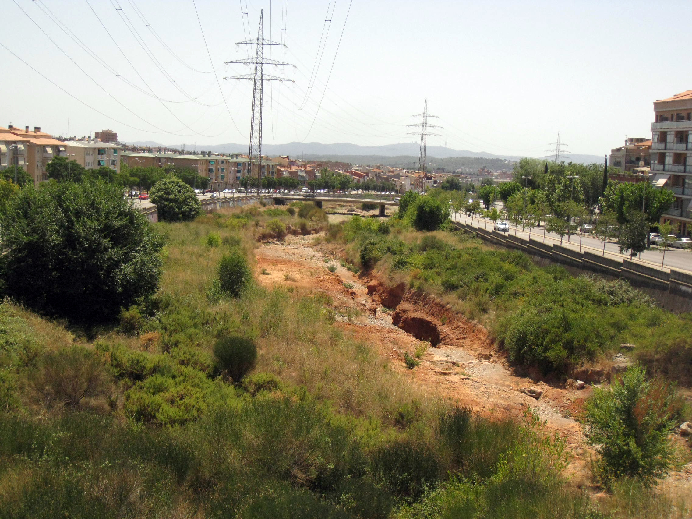 La riera de les Arenes, des del pont de la carretera de Castellar (Terrassa)